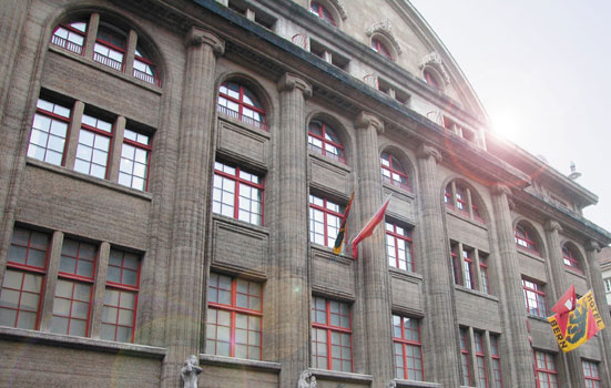 Hotelbern Front